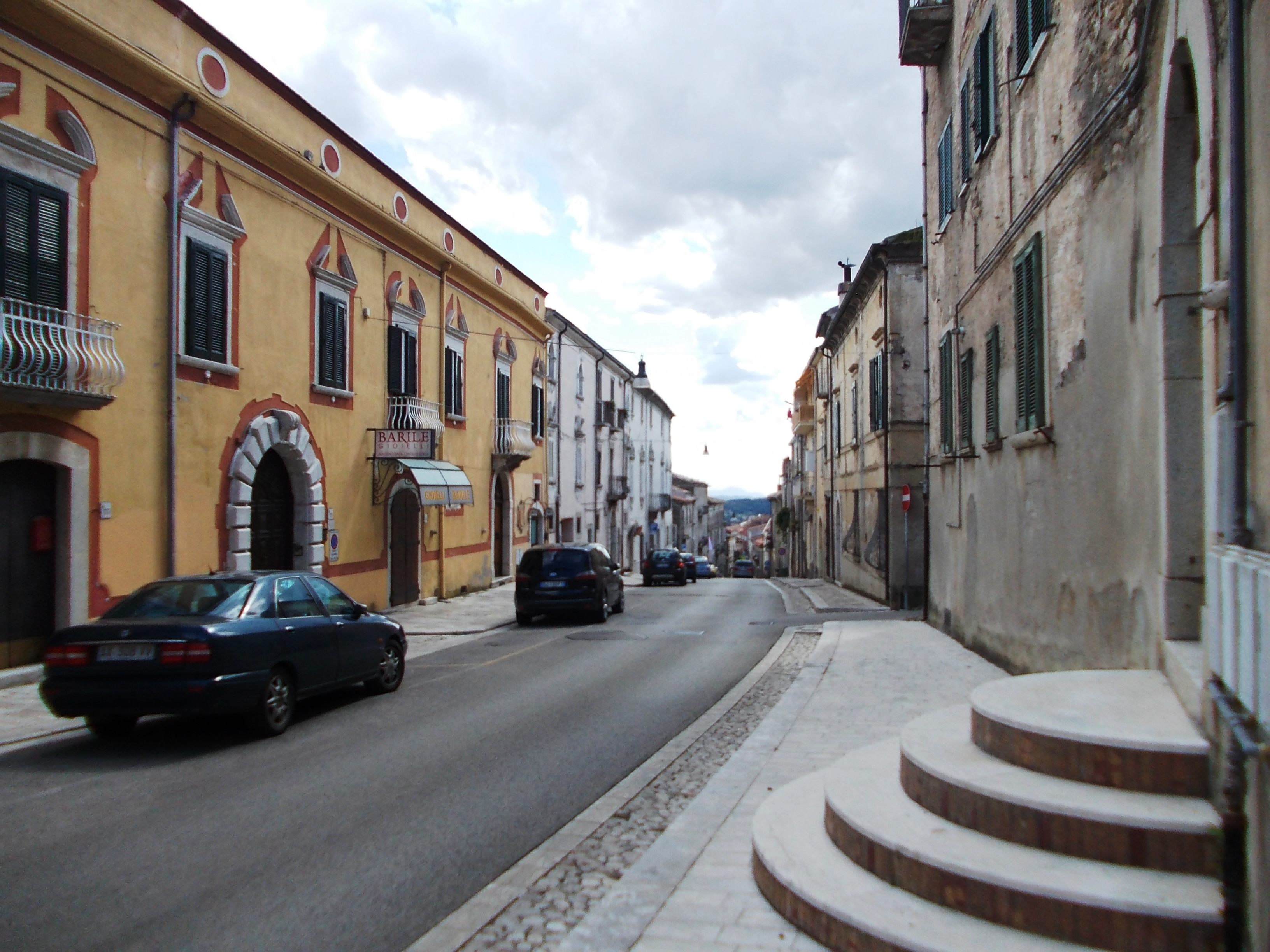 Scorcio di Via Michele Ungaro in Cerreto Sannita (Benevento, Italia)